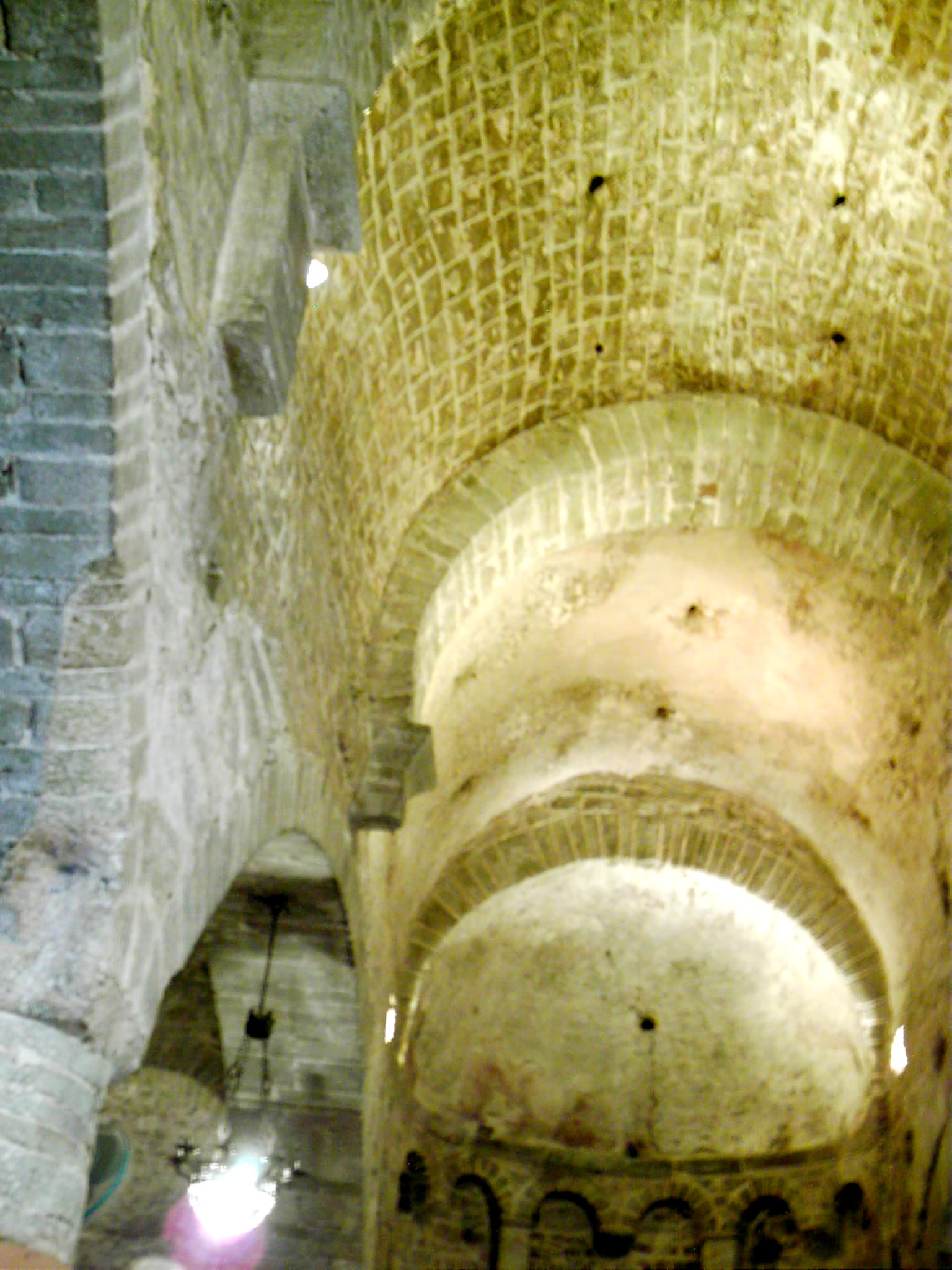 église de st Joan à Palau Saverdera (Alt Empordà)